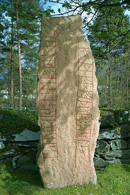 Inskriften lyder: Styrlag (Styrlaug) satte denna sten efter "kaur", sin fader. Motiv: Vg9 Leksbergs kyrkogård Nyckelord: Runor Kategori: Runristning/runsten Inskriften lyder: Styrlag (Styrlaug) satte denna sten efter "kaur", sin fader.